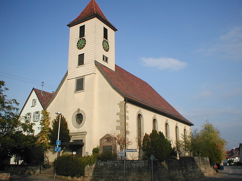 St. Nikolauskirche in Aspach-Kleinaspach, Baden-Württemberg, Deutschland